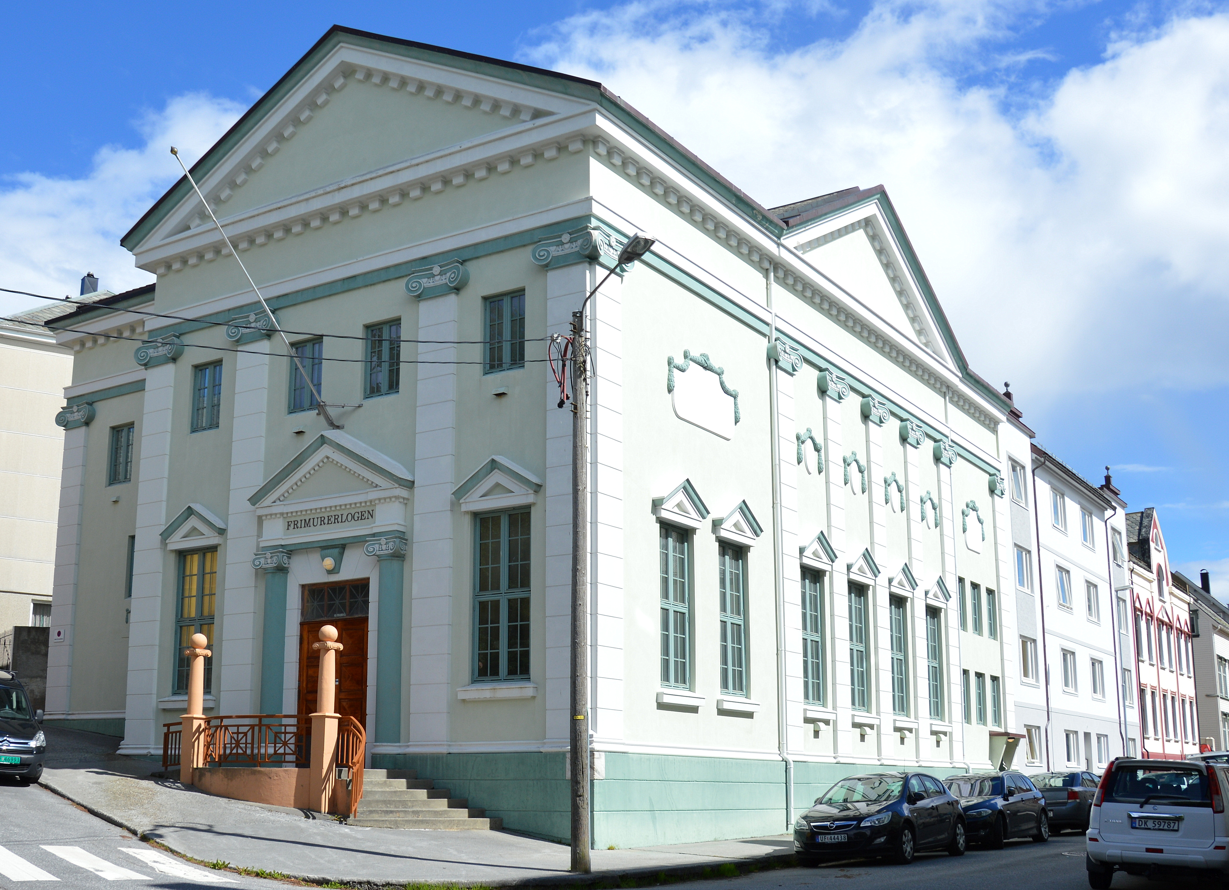 Haus der Freimaurerloge Alesund